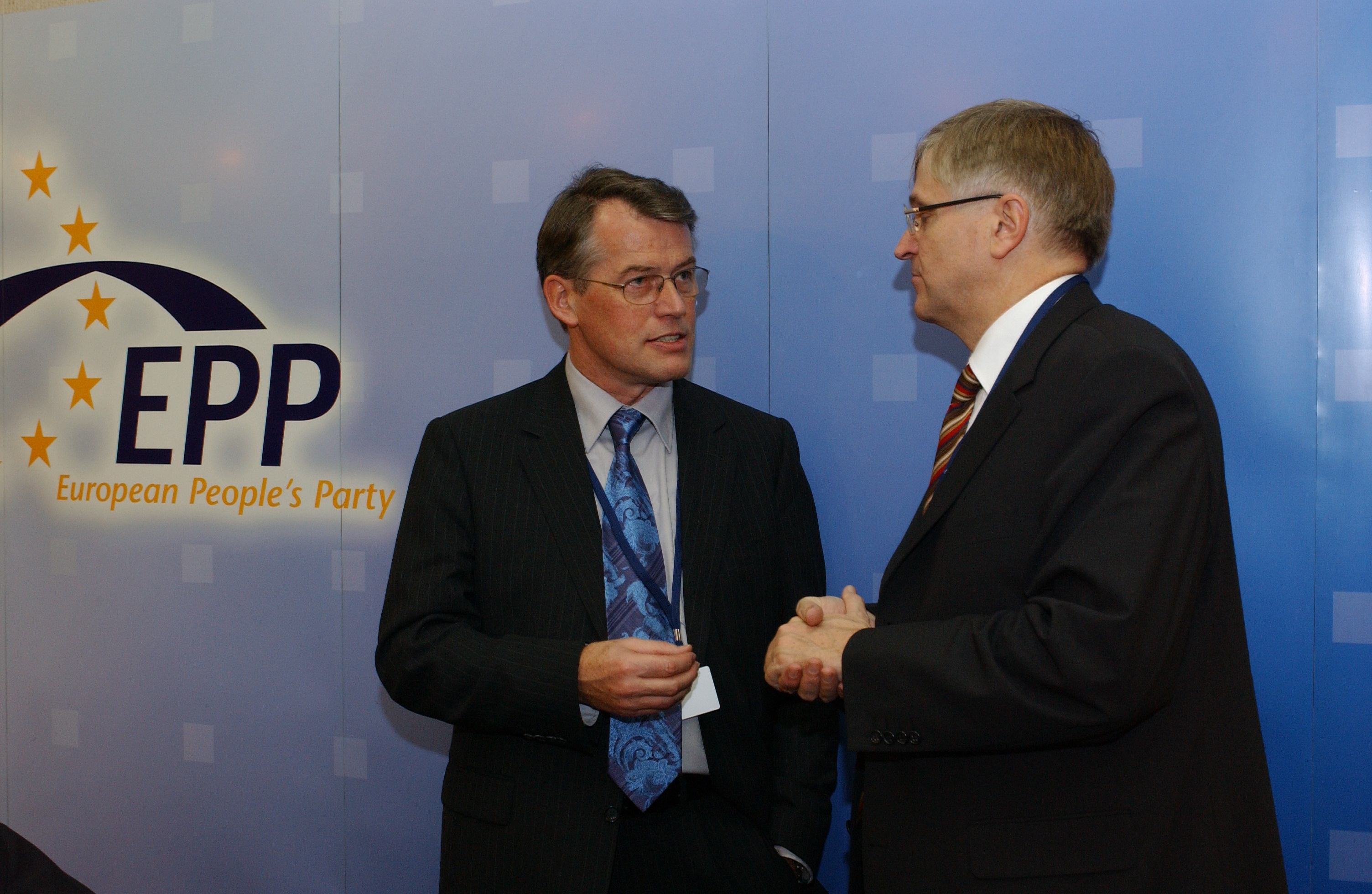 EPP Summit 15 December 2005